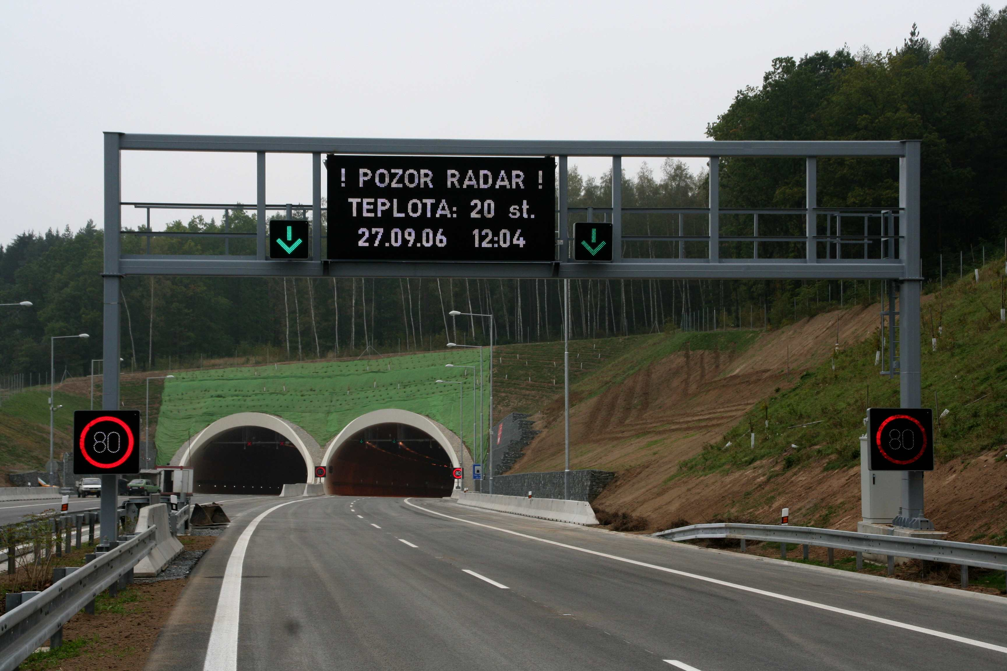 Tunnel Valík, Highway D5, Czech Republic; V popředí portál s proměnnými dopravními značkami (PDZ) a zařízením pro provozní informace (ZPI)